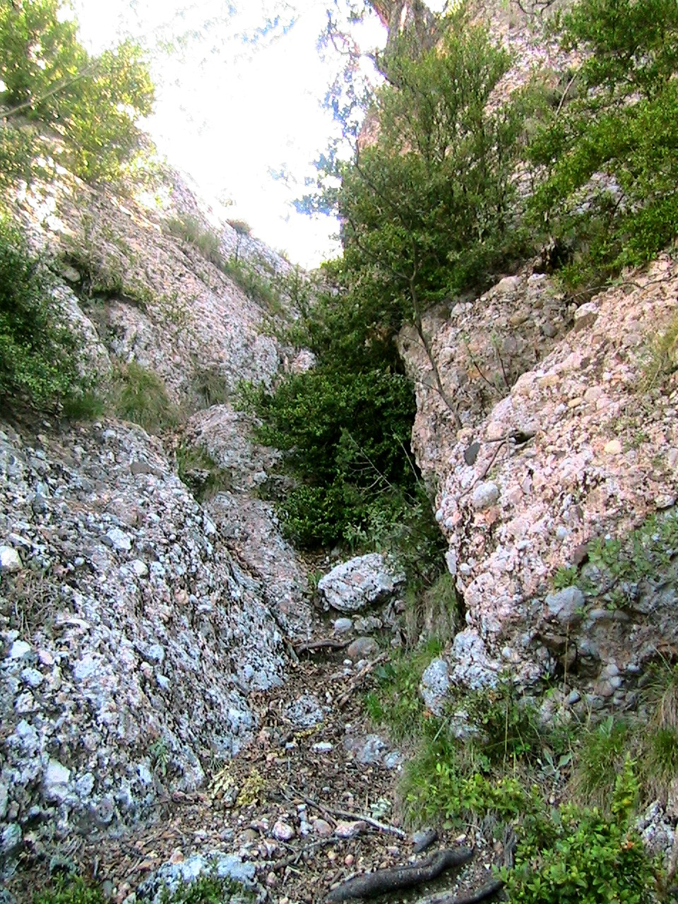 Canal inicial per on puja el Grauet de Valielles